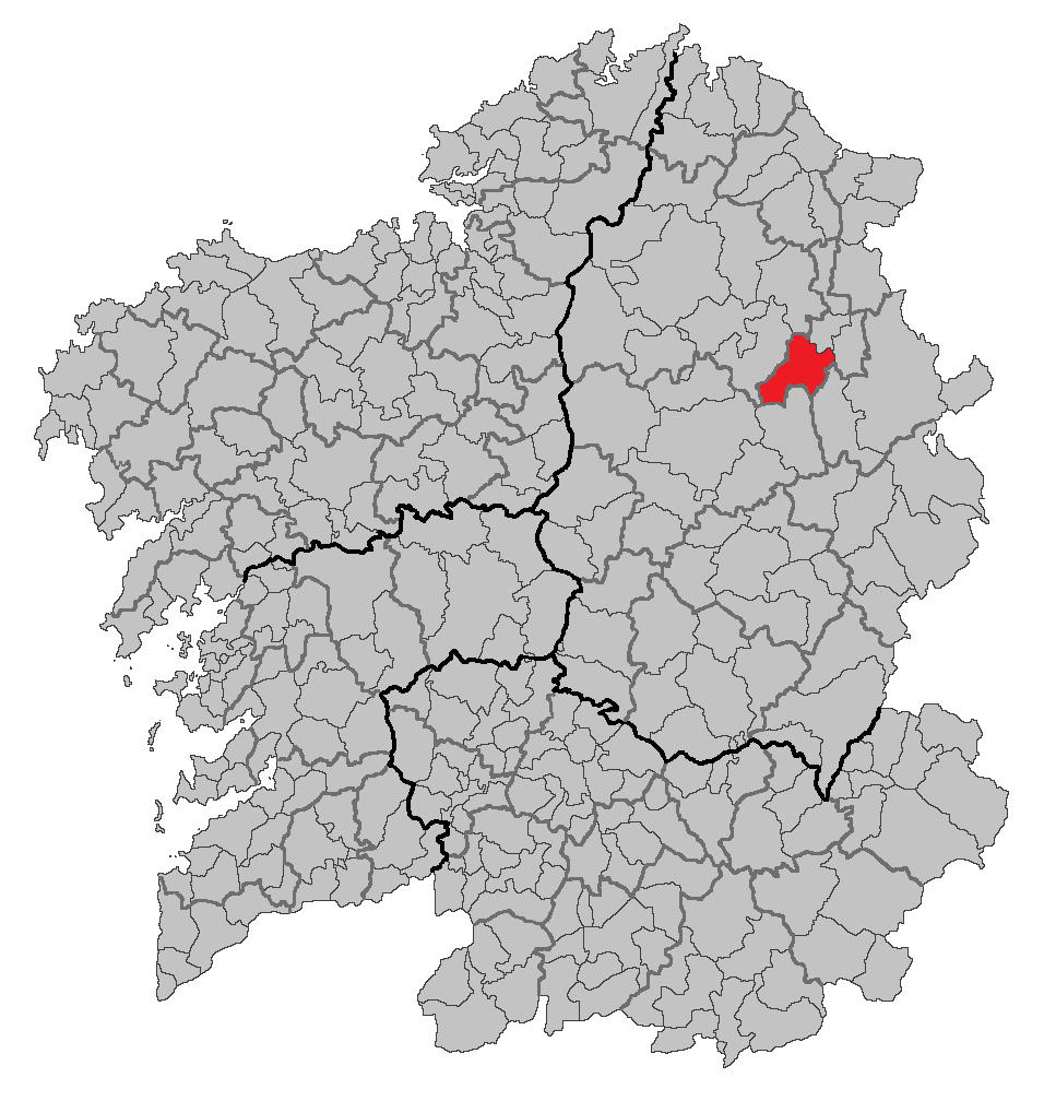 Mapa coa localización do concello de Pol.